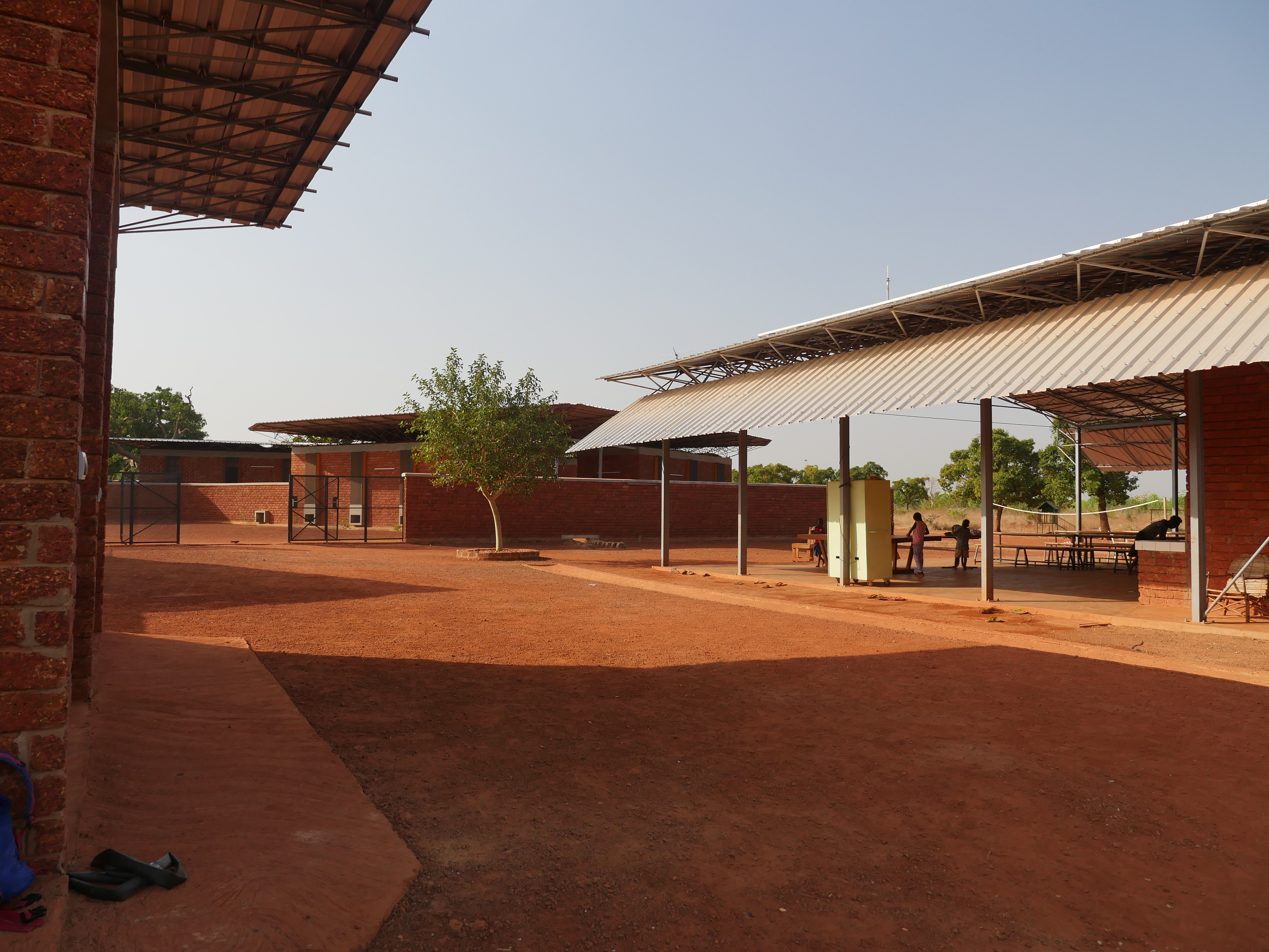 Photo intérieur du Centre Noomdo